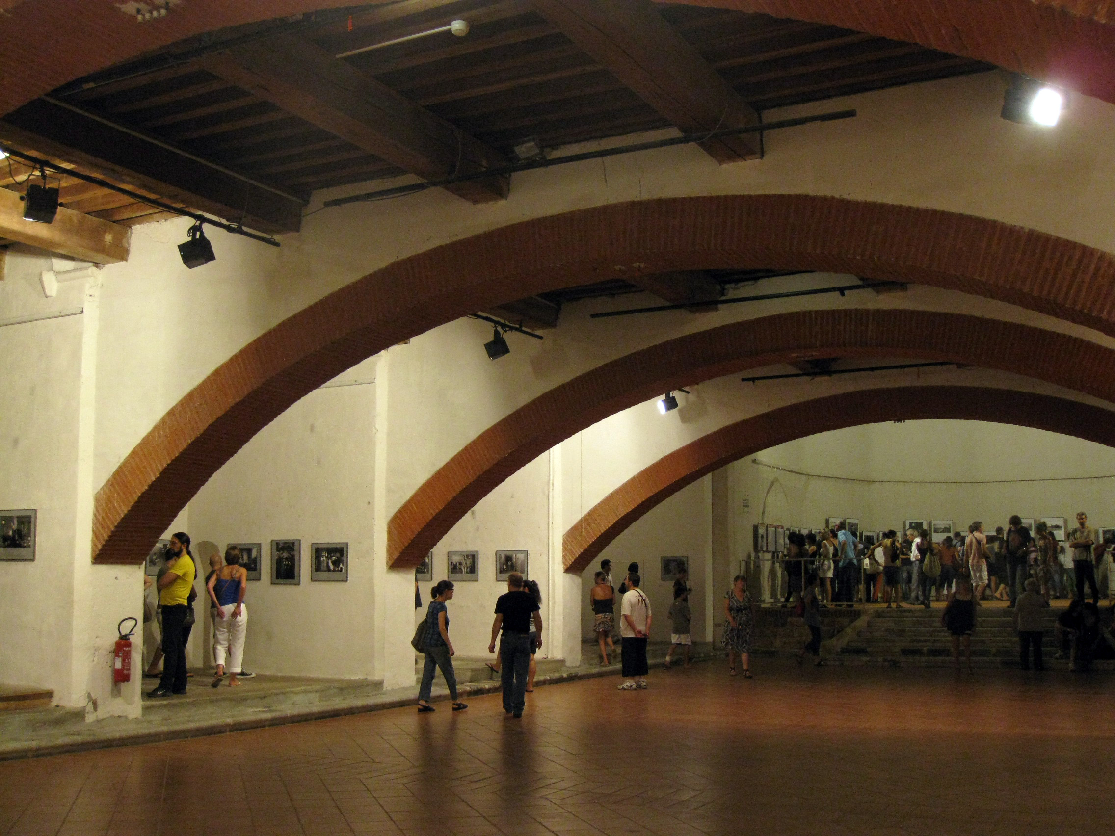 Convent dels Mínims (Perpinyà), el pis inferior de l'església durant la celebració del certamen de fotoperiodisme Visa pour l'Image .